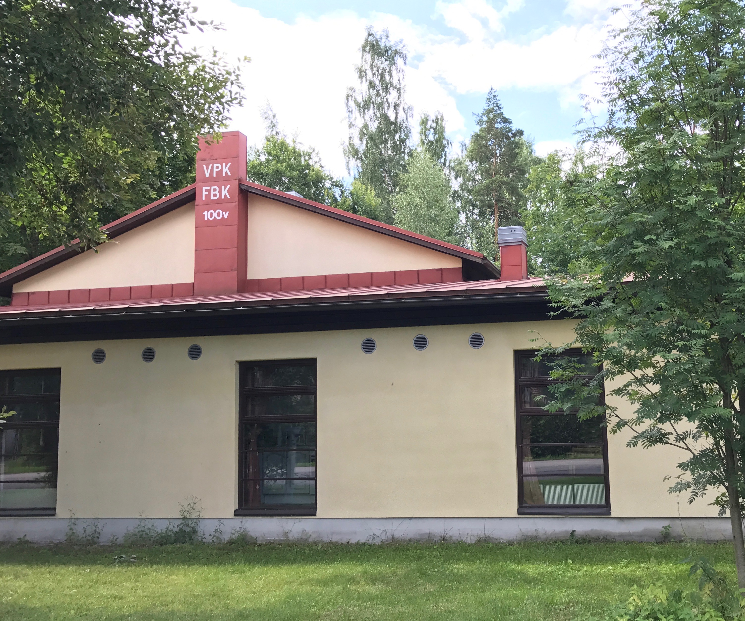 Pitäjänmäen VPK:n asema Helsingissä.